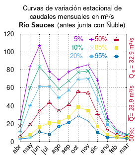 Curvas de variación estacional del río Sauces antes de junta con el río Ñuble. # Dirección General de Aguas # Diagnóstico y clasificación de los cursos y cuerpos de agua según objetivos de calidad. Cuenca del río Itata. # Santiago de Chile # Ministerio de Obras Públicas (Chile) # 2004 # url: # urlarchivo: # Tabla 4.1: Río Sauces antes junta con Ñuble (m3/s) pág. 40 mes 5% 10% 20% 50% 85% 95% abr 24.696 17.448 11.776 6.260 3.784 3.213 may 83.381 60.188 40.556 19.071 7.529 4.362 jun 107.384 83.479 61.532 34.350 16.752 10.988 jul 78.727 70.930 61.487 43.438 21.208 8.150 ago 69.252 59.334 49.203 34.402 22.140 17.090 sep 78.235 67.949 57.283 41.334 27.653 21.838 oct 83.207 77.169 69.856 55.879 38.664 28.552 nov 85.728 78.813 70.438 54.431 34.714 23.134 dic 68.710 58.394 47.640 31.397 16.968 10.420 ene 27.578 23.600 19.453 13.189 7.624 5.099 feb 13.175 11.632 10.002 7.496 5.255 4.265 mar 8.329 7.641 6.882 5.636 4.407 3.814 This plot was created with Gnuplot.